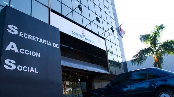 Edificio de la SAS